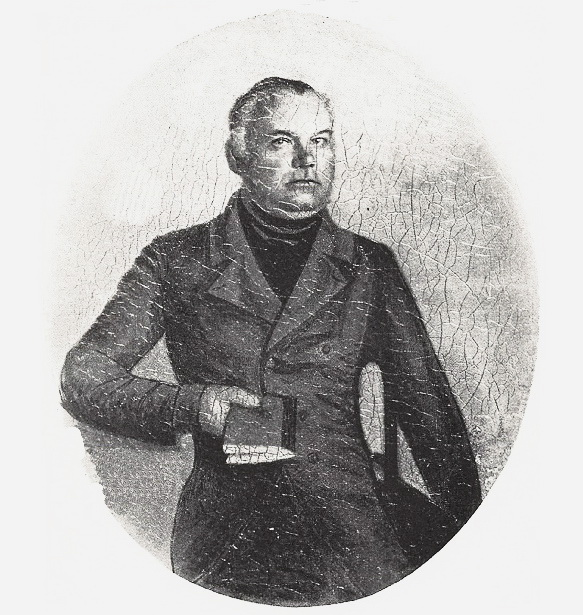 Український лінгвіст, етнограф, фольклорист, історик, поет, священик УГКЦ, педагог, громадський діяч, співзасновник об'єднання «Руська трійця» Яків Головацький.